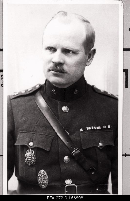 Kindralstaabi käsundusohvitser kolonelleitnant Aleksander Jaakson (1927).